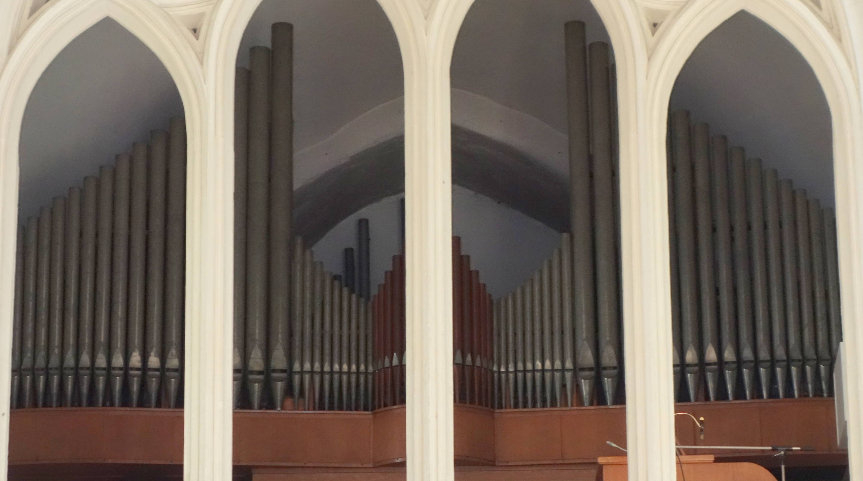 St. Martini Münster, Nordrhein-Westfalen, Deutschland